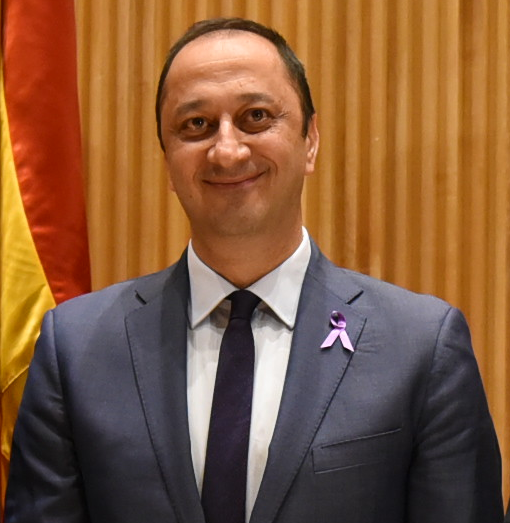 Fotografía del diputado nacional por el PSOE y exdelegado del Gobierno en Andalucía, Alfonso Rodríguez Gómez de Celis, en la presentación del libro de José Bono, en noviembre de 2019.